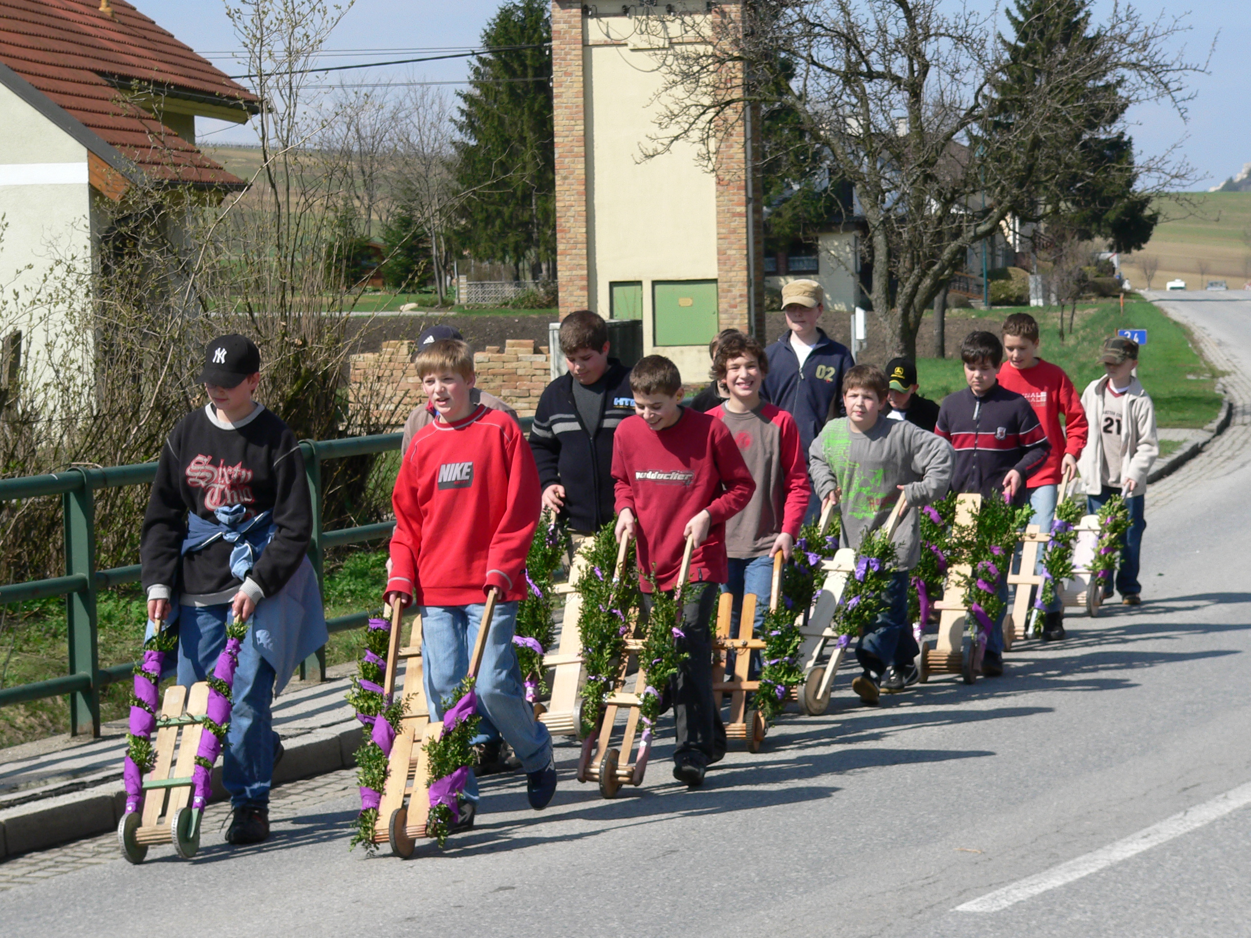 Osterratschen mit Schubratschen im Weinviertel (Ameis, 15.04.2006)